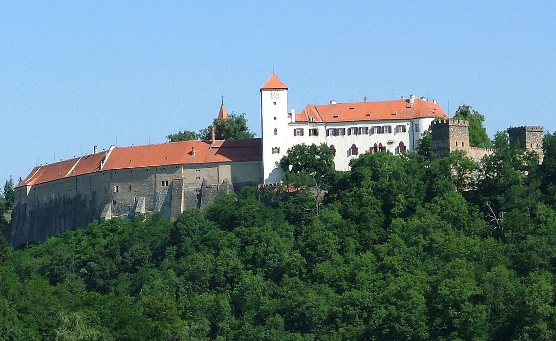 Hrad Bítov (okres Znojmo)